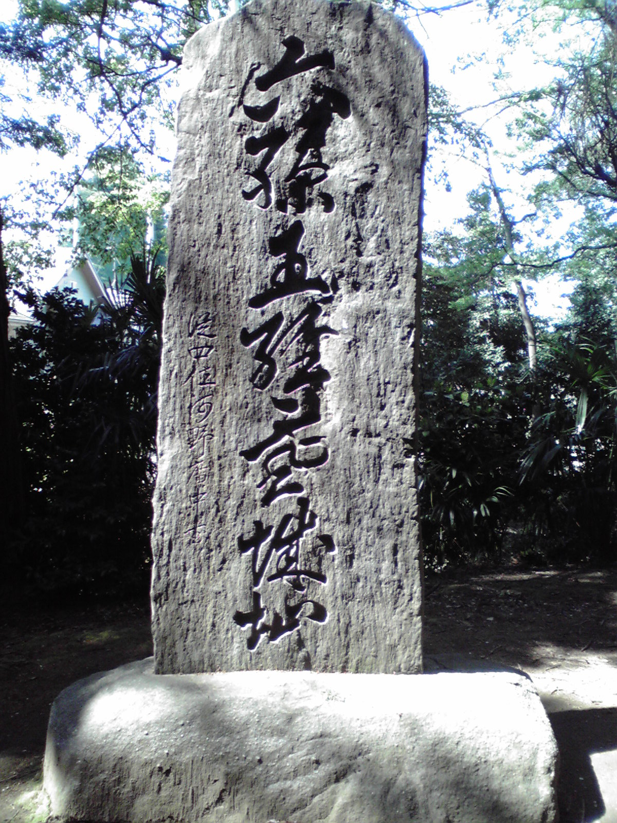 伝源経基館跡にある六孫王経基城址の石碑。源経基は六孫王と云われた。